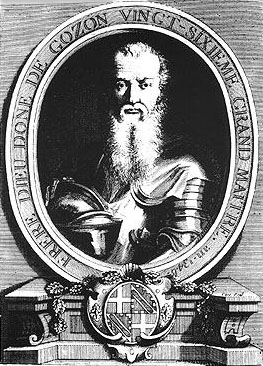 Stich von Dieudonné_de_Gozon